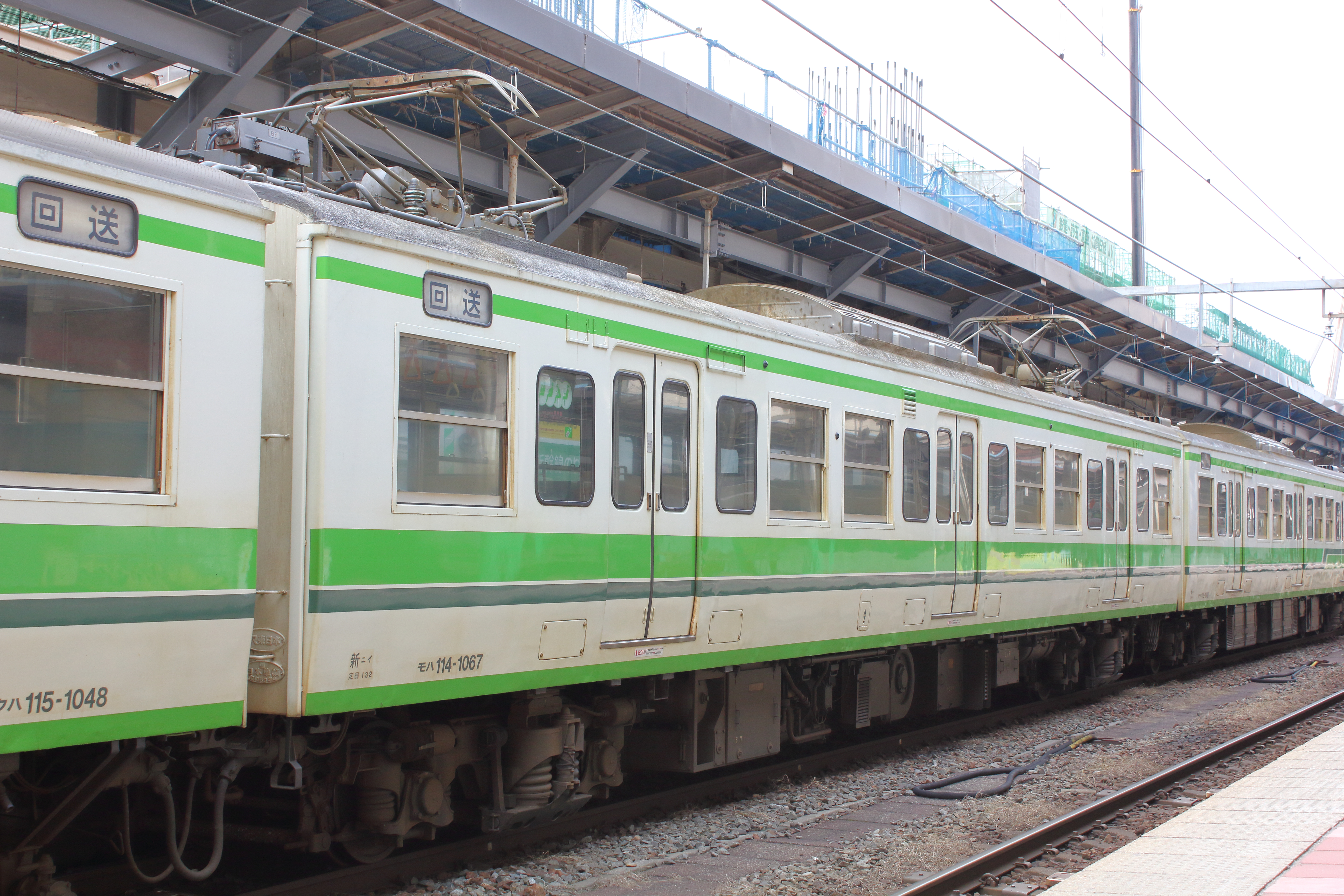 モハ114-1067